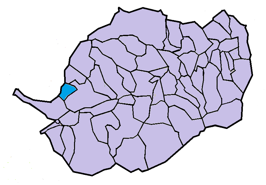 Caudiers de Conflent a la seva comarca, a partir del mapa municipal del Conflent de lliure disposició adaptat al Nomenclàtor toponímic aprovat el 2007